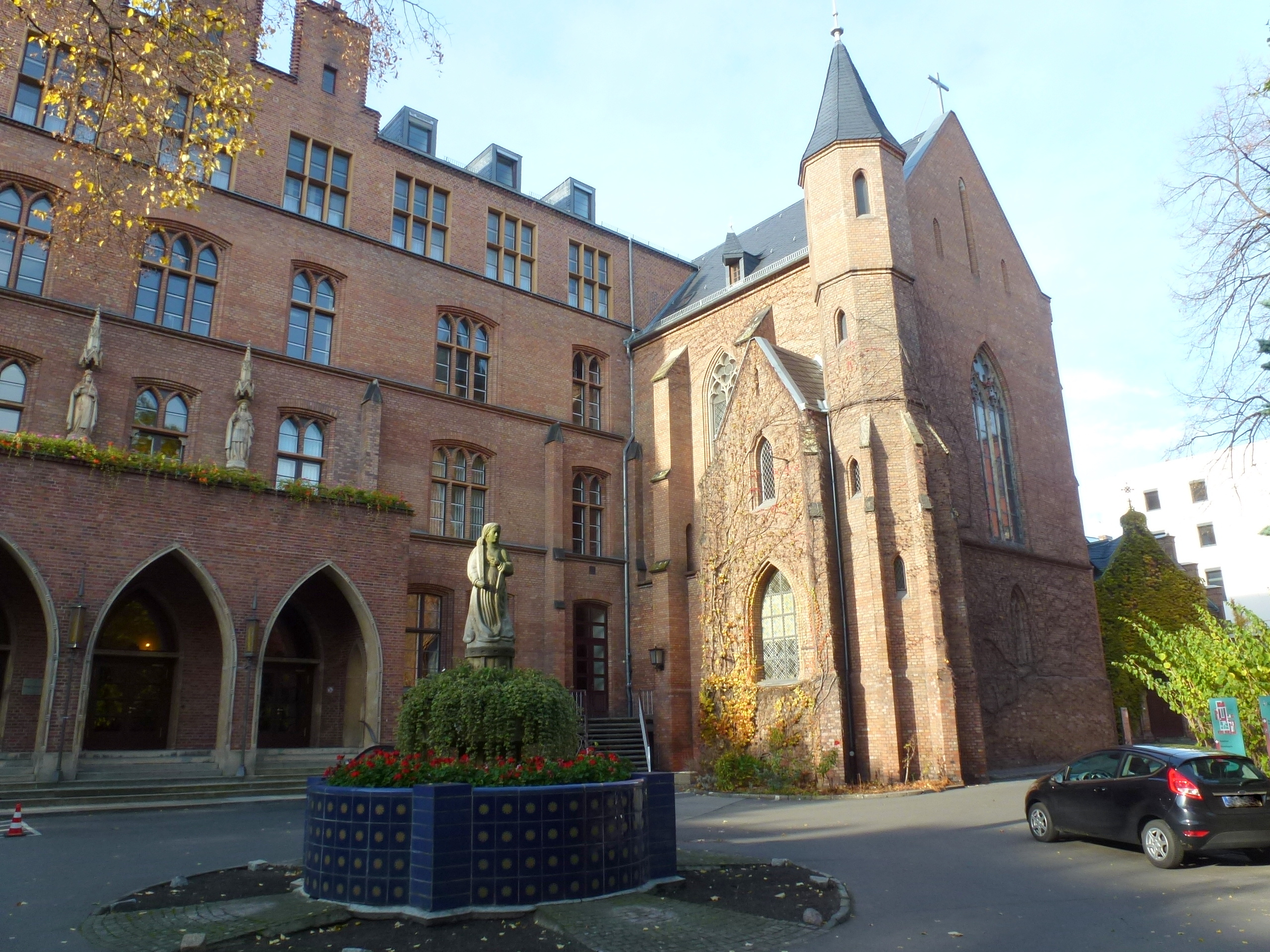 Mitte Große Hamburger Straße St. Hedwig-Krankenhaus, davor der Agathabrunnen